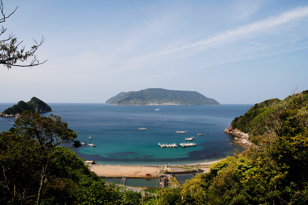 山口県上関町長島の上関原子力発電所計画地と祝島 Nagashima-Island & Iwaishima-Island in Japan.